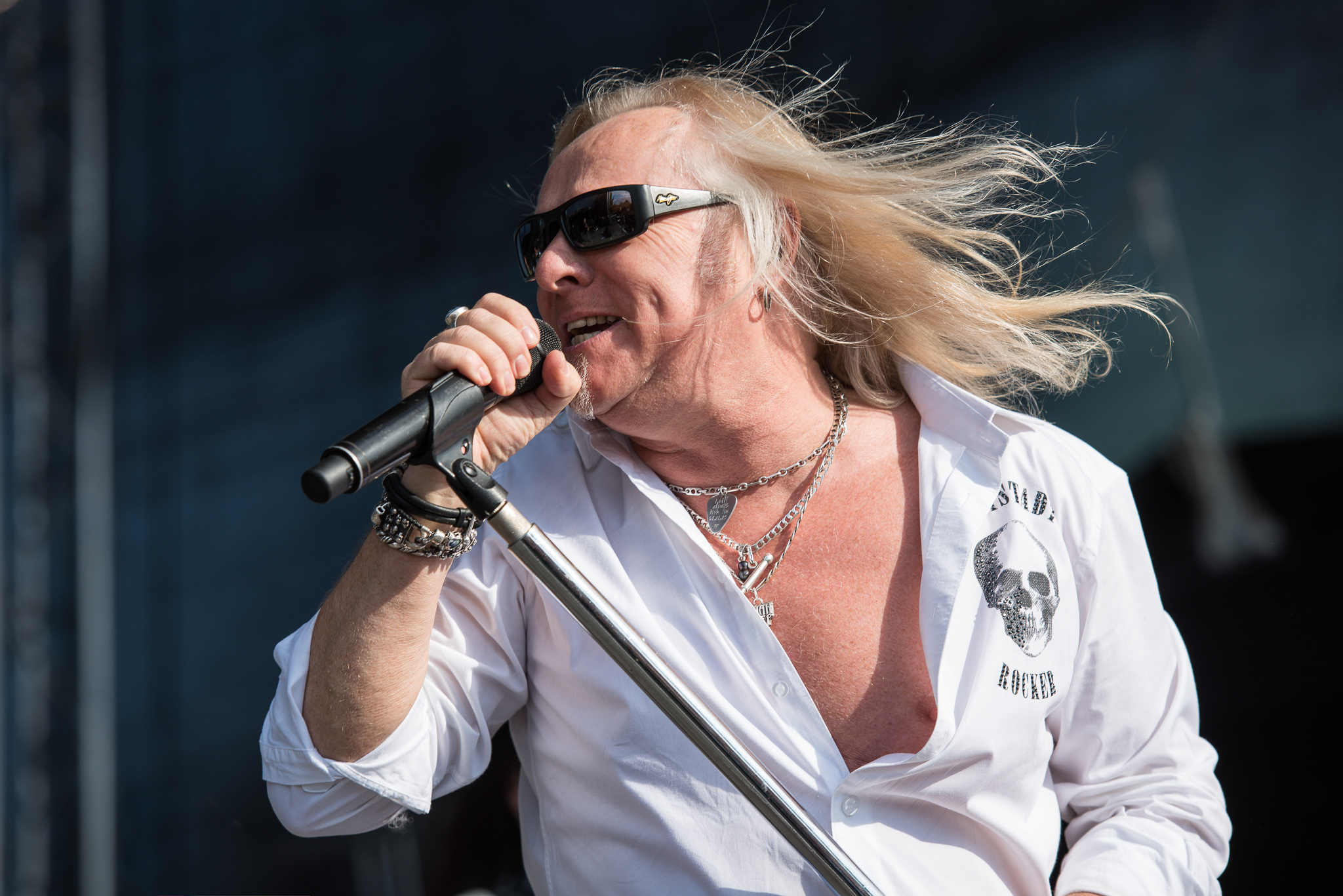 Bernie Shaw,Brombachsee,Concertbüro Franken,Festival,Konzert,Lieder am See,Livekonzert,Livemusik,Musik,Uriah Heep